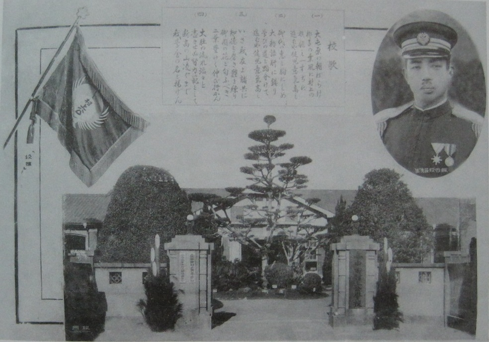 臺中村上公學校校門與校旗，右上角為校長飯田真名豬